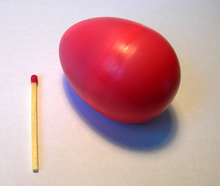 Chicken Shake / Eggshaker mit Streichholz zum Größenvergleich